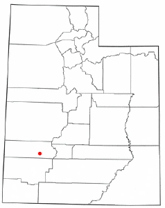 Localización de Minersville, Utah